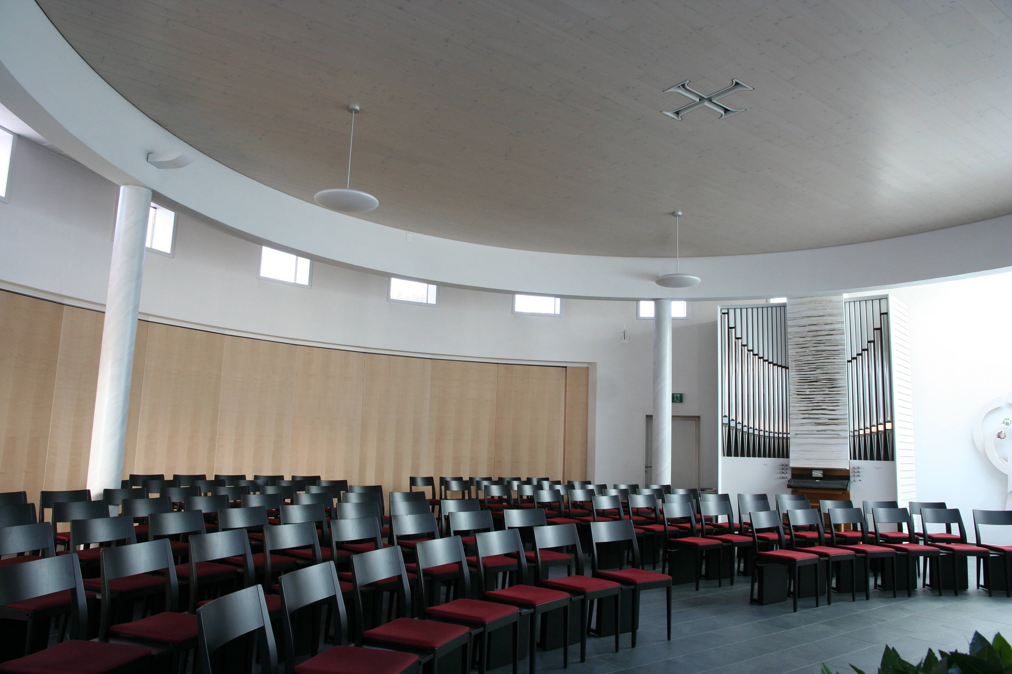 Römisch-katholische Kirche St. Leonhard Feuerthalen, Innenansicht